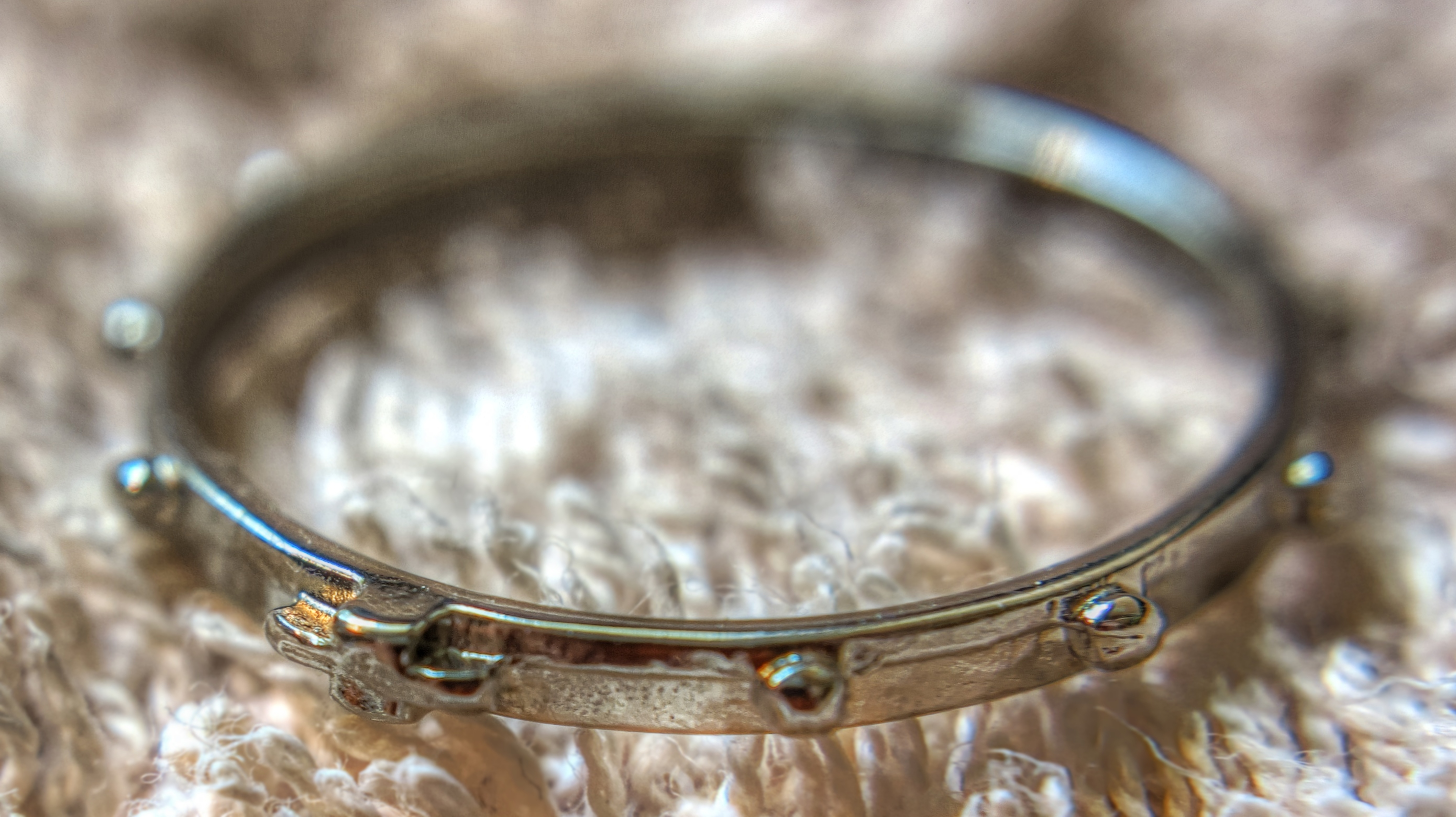 Rosenkranz-Ring ausgeführt als Fingerring, Durchmesser 21mm